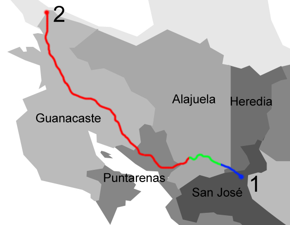 Mapa de la Carretera Interamericana Norte, Costa Rica